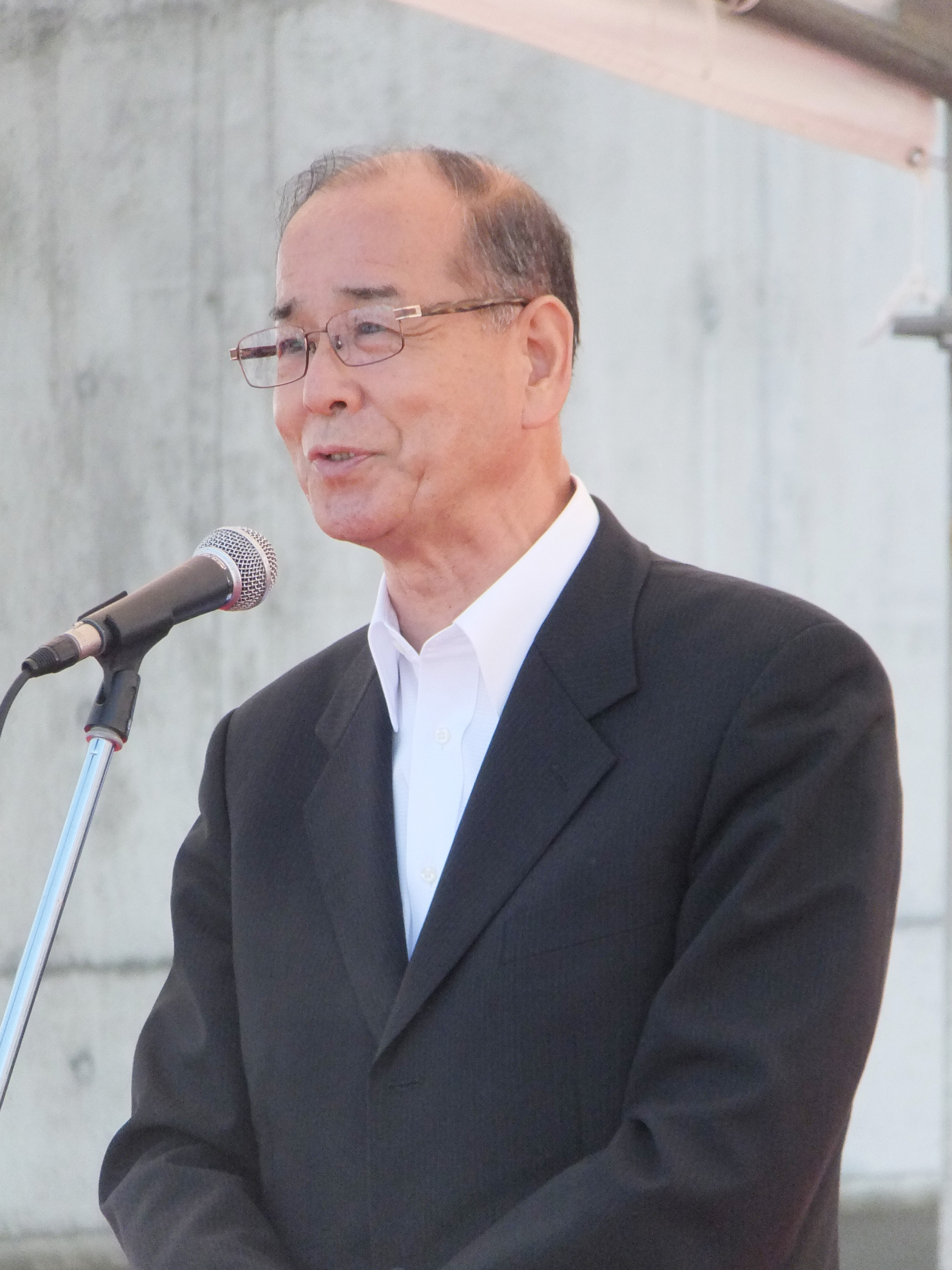 鈴木克昌。国道23号豊橋バイパス（前芝IC - 豊川為当IC）開通記念イベントにて。2012年10月7日